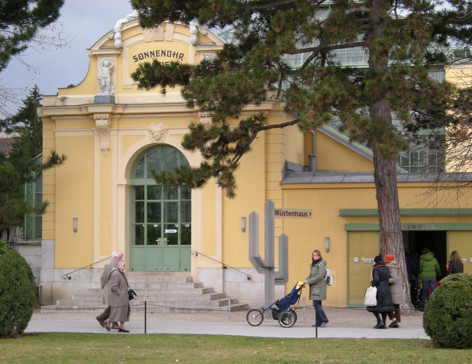 Sundial House (Schönbrunn), now Wüstenhaus, actual entrance.